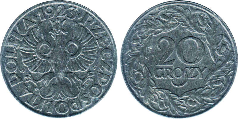 20 groszy 1923 cynk